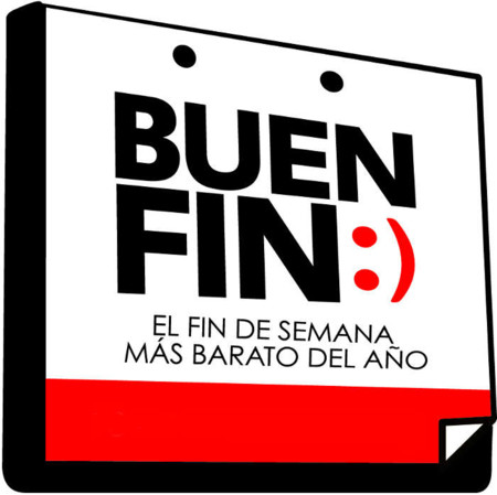 Logotipo de El Buen Fin